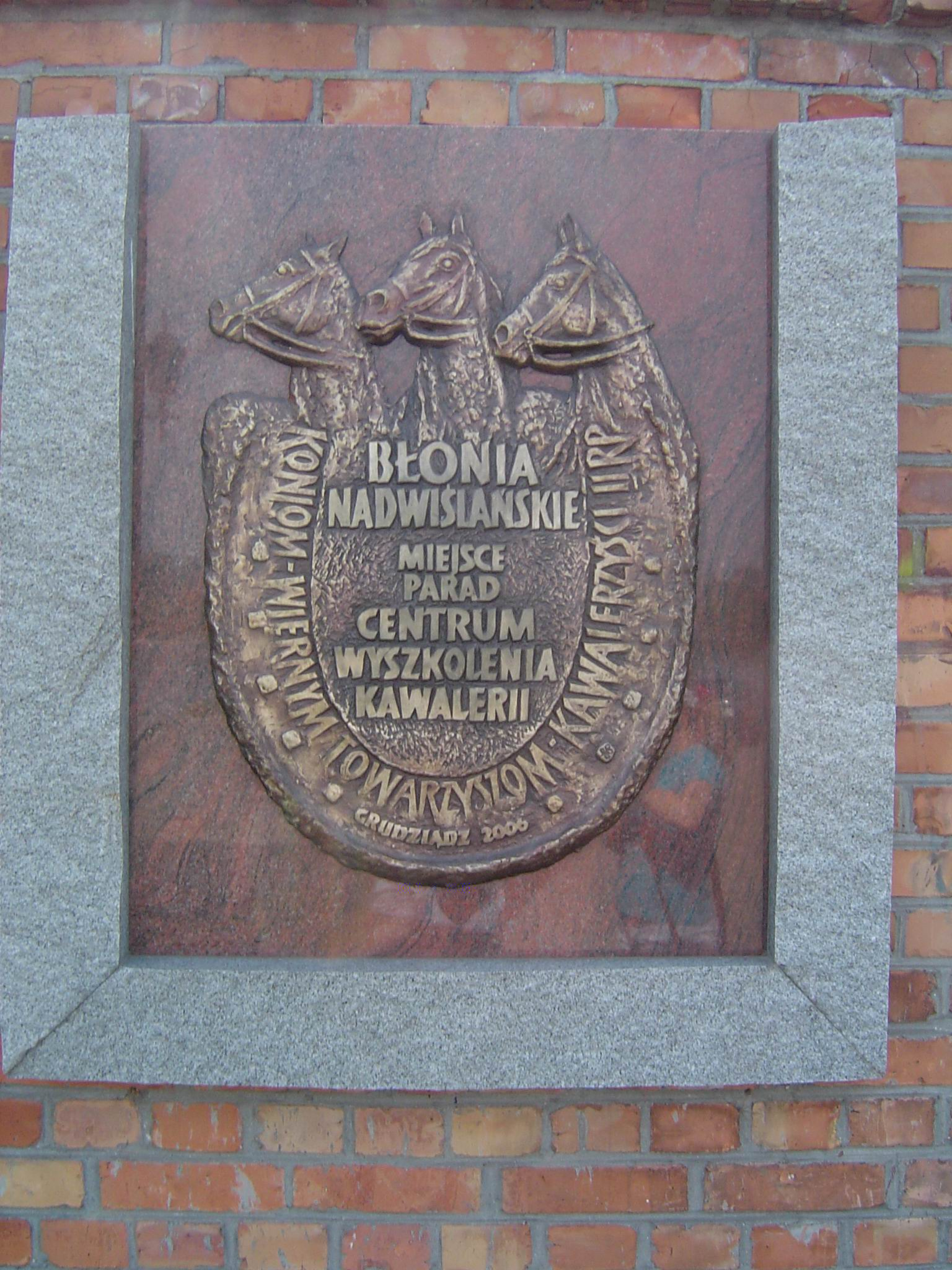 Tablica poświęcona koniom z Centrum Wyszkolenia Kawalerii w Grudziądzu